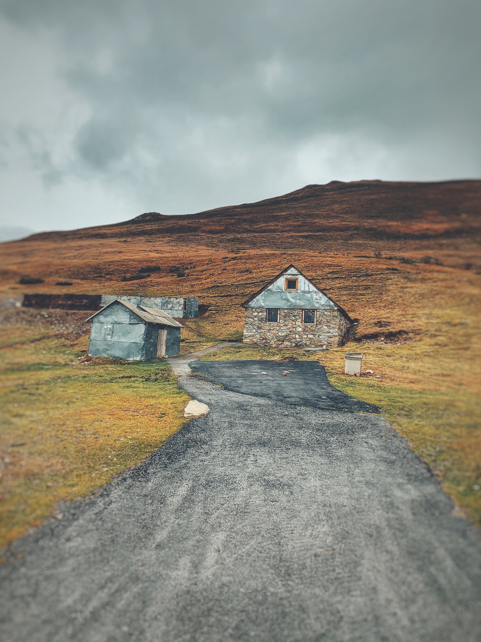 Parku Kombëtar Sharri, Prizren, Dragash Lartesia 1900m.